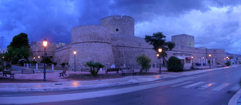 Manfredonia e il suo castello Svevo Angioino. - Salvatore Triventi - FotoDaSogno